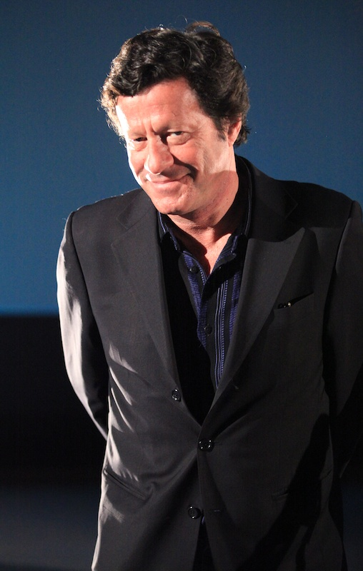 Joaquim de Almeida au Festival international du film d'amour de Mons 2011.